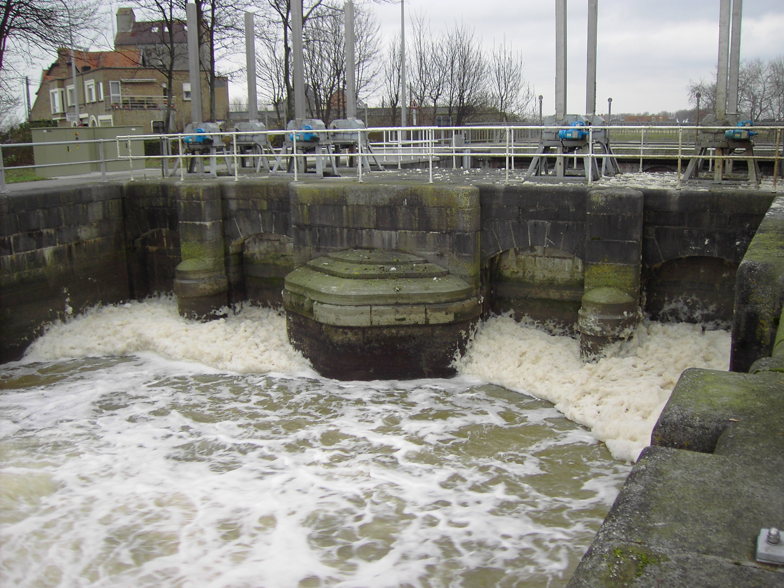 Opgehaalde schuiven en spuien doorheen de overlaten van het Scheursas